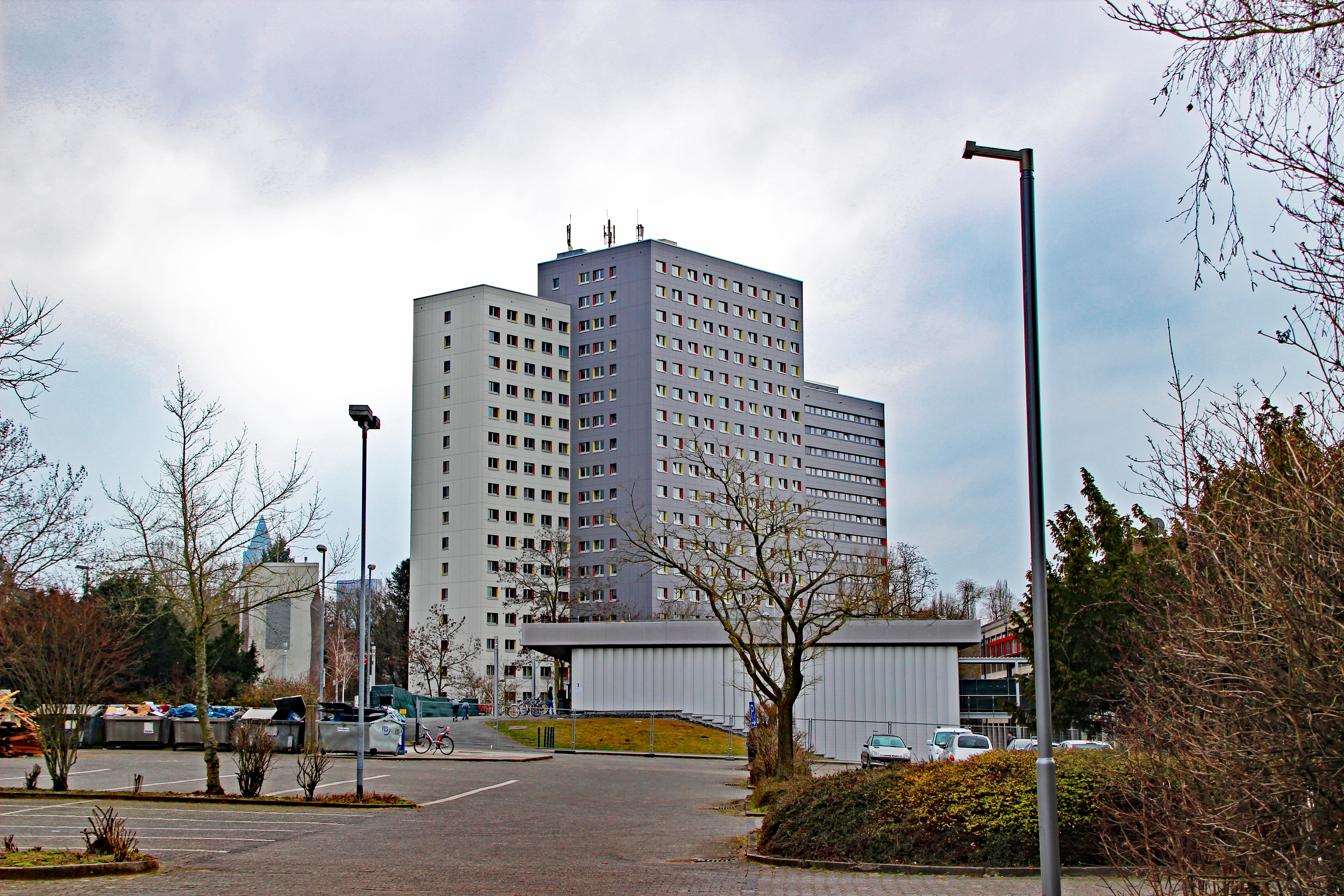 Bildinhalt: Studentenwohnheim in der Ginnheimer Landstraße Aufnahmeort: Frankfurt am Main, Deutschland